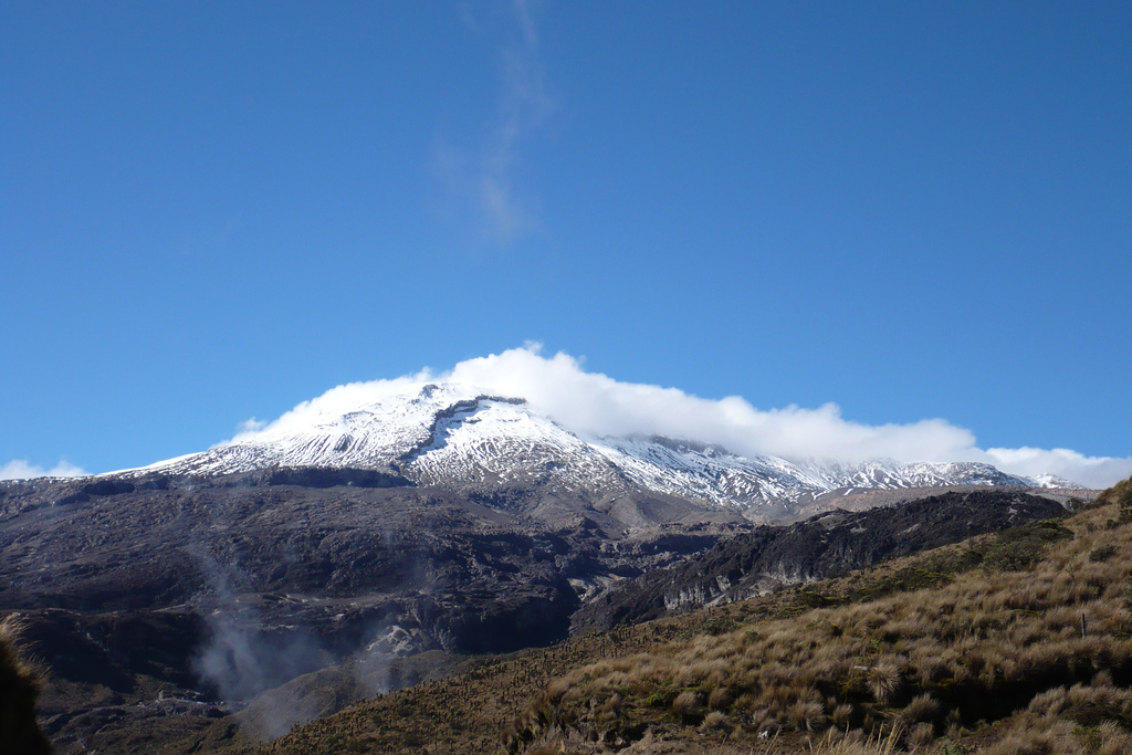 Volcan Nevado del Ruiz Visto desde la carretera hacia Murillo, cerca de la Laguna negra